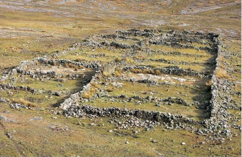 Maraycalla - Ancash